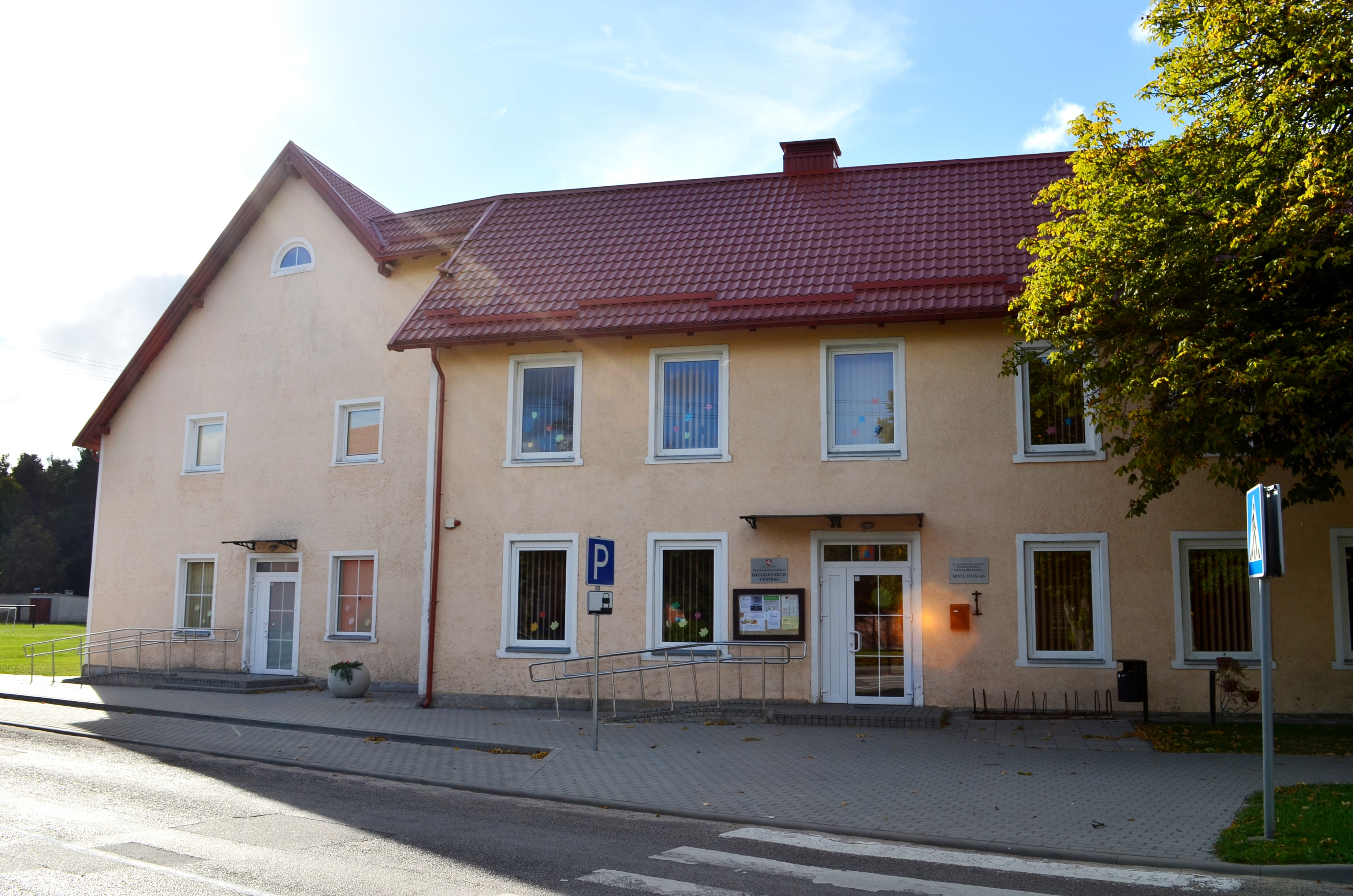 Kintų biblioteka, Šilutės raj.